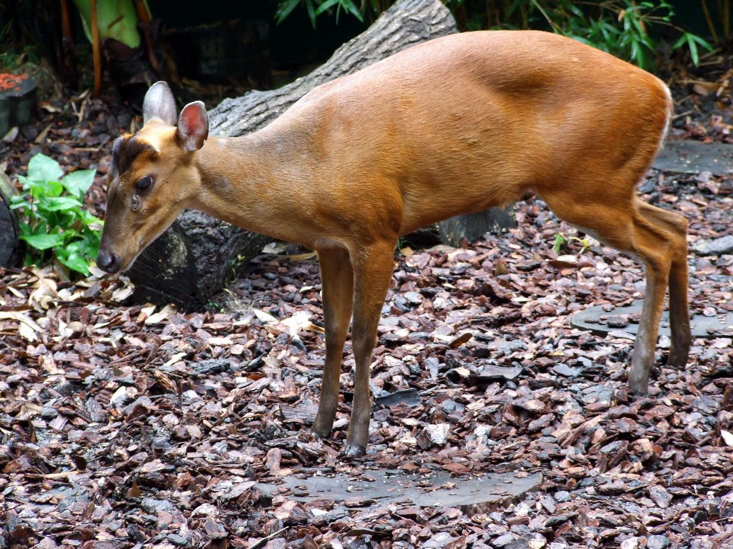 中文（香港）: 雌性赤麂